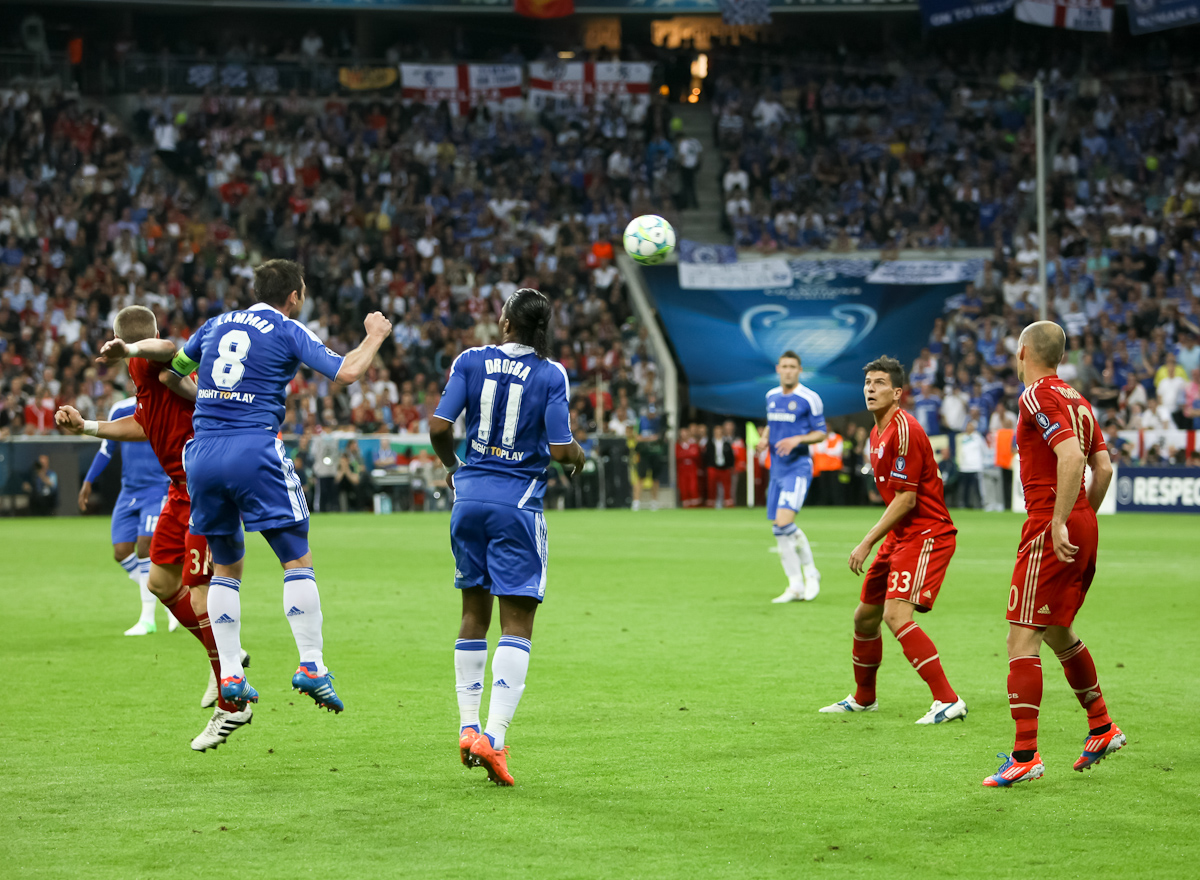 RA1_6061